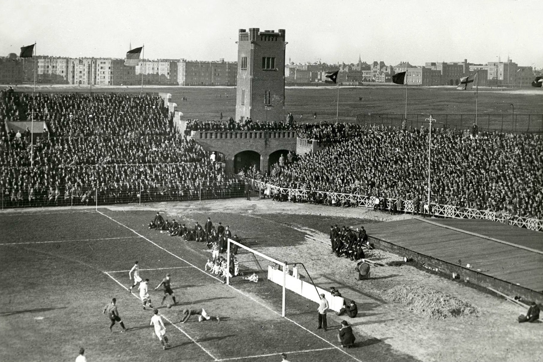 Voetbal interland Nederland-Frankrijk (uitslag 8-1) Het moment dat Nederland door toedoen van Wim Addicks het zevende doelpunt scoort, stadion Amsterdam, Nederland 2 april 1923.